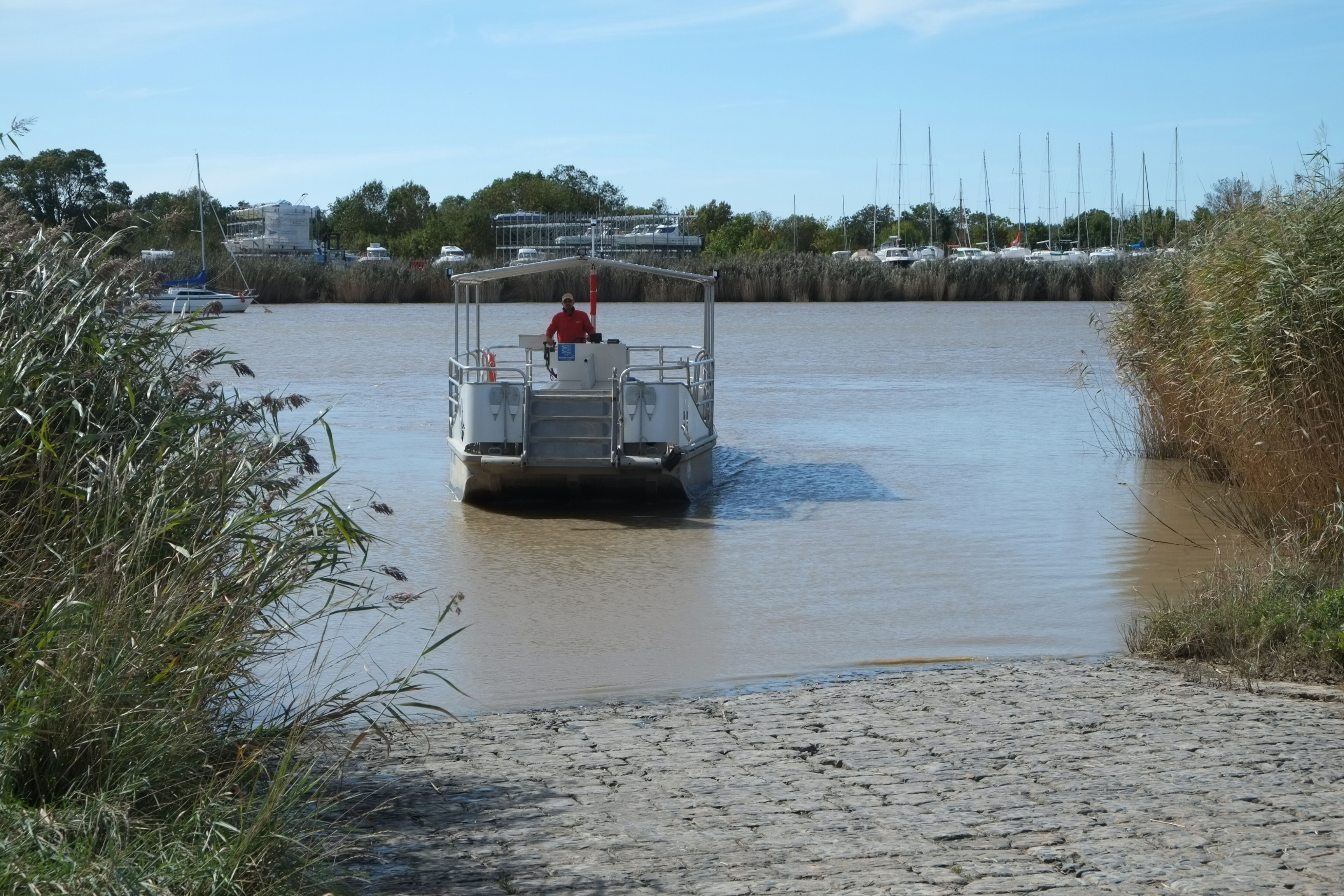 Bateau-passeur le Rohan (bac) Soubise Charente-Maritime France